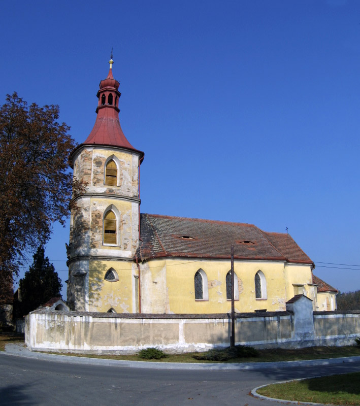 Barokně gotický kostel sv. Prokopa ve Všehrdech.